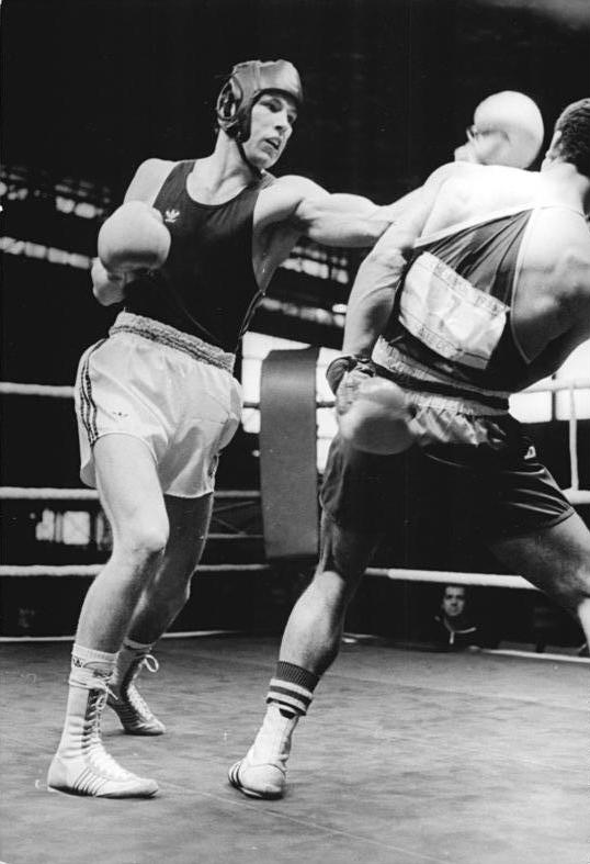 Henry Maske, Ahmed Dine ADN-ZB Lehmann 2.1.86-Halle: 15. Chemiepokal-Turnier im Boxen-Halbfinale-Im Mittelgewicht wurde der Europameister und Weltcupgewinner Henry Maske (ASK Vorwärts Frankfurt-Oder-l.) einstimmiger Punktsieger über den albanischen Boxer Ahmed Dine.